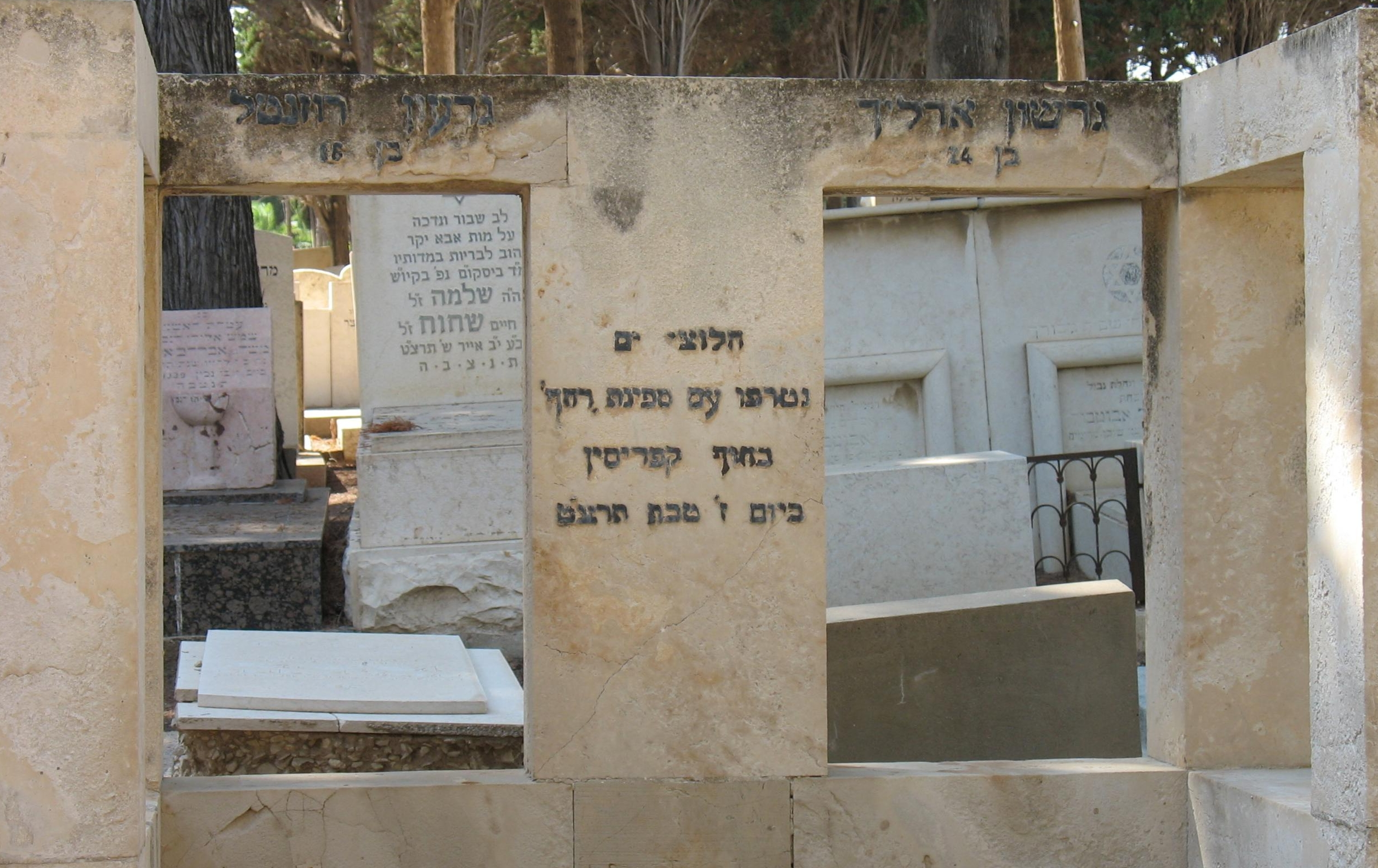 קברם המשןתף של נספי האניה רחף